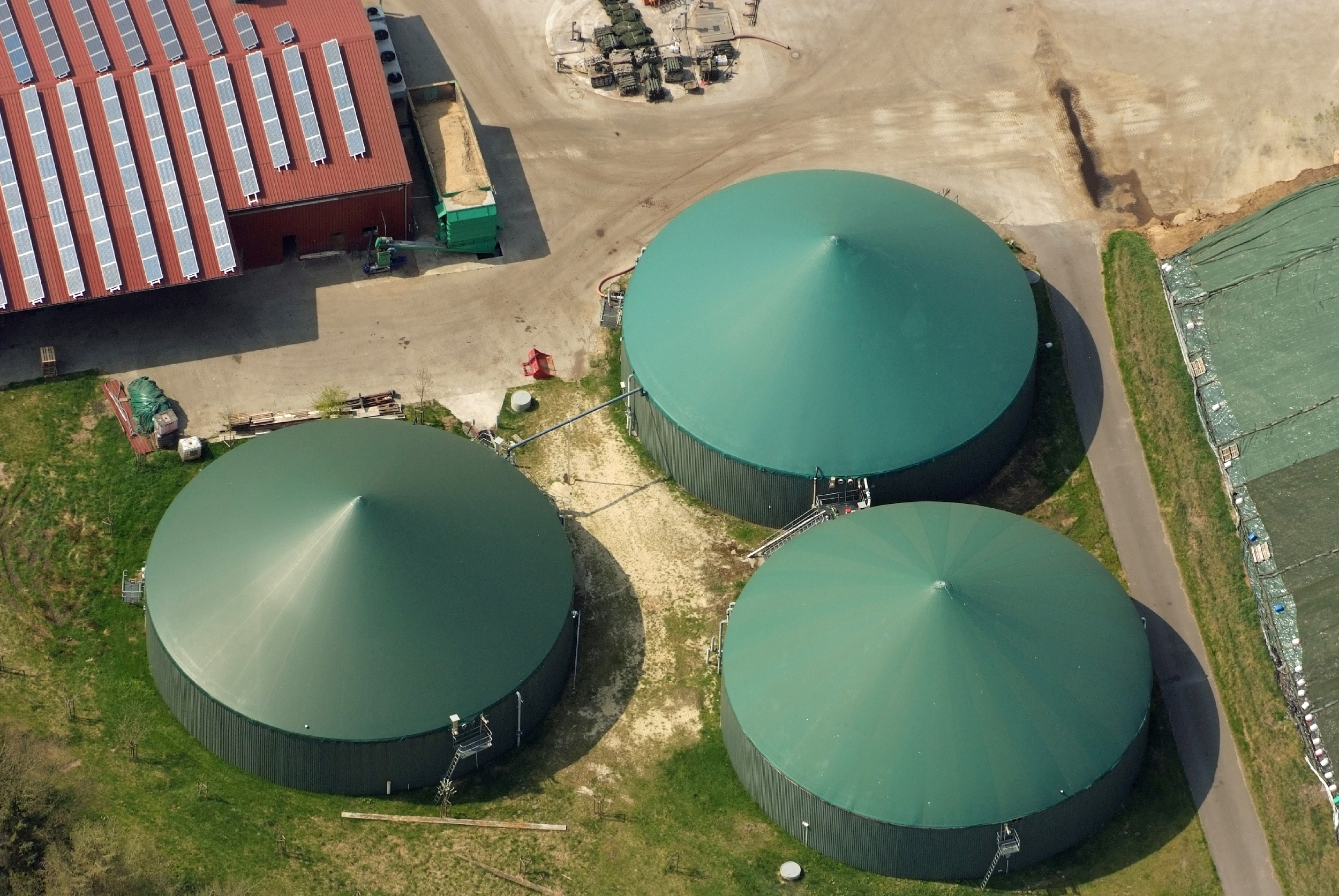 Fotoflug von Nordholz-Spieka nach Oldenburg und Papenburg